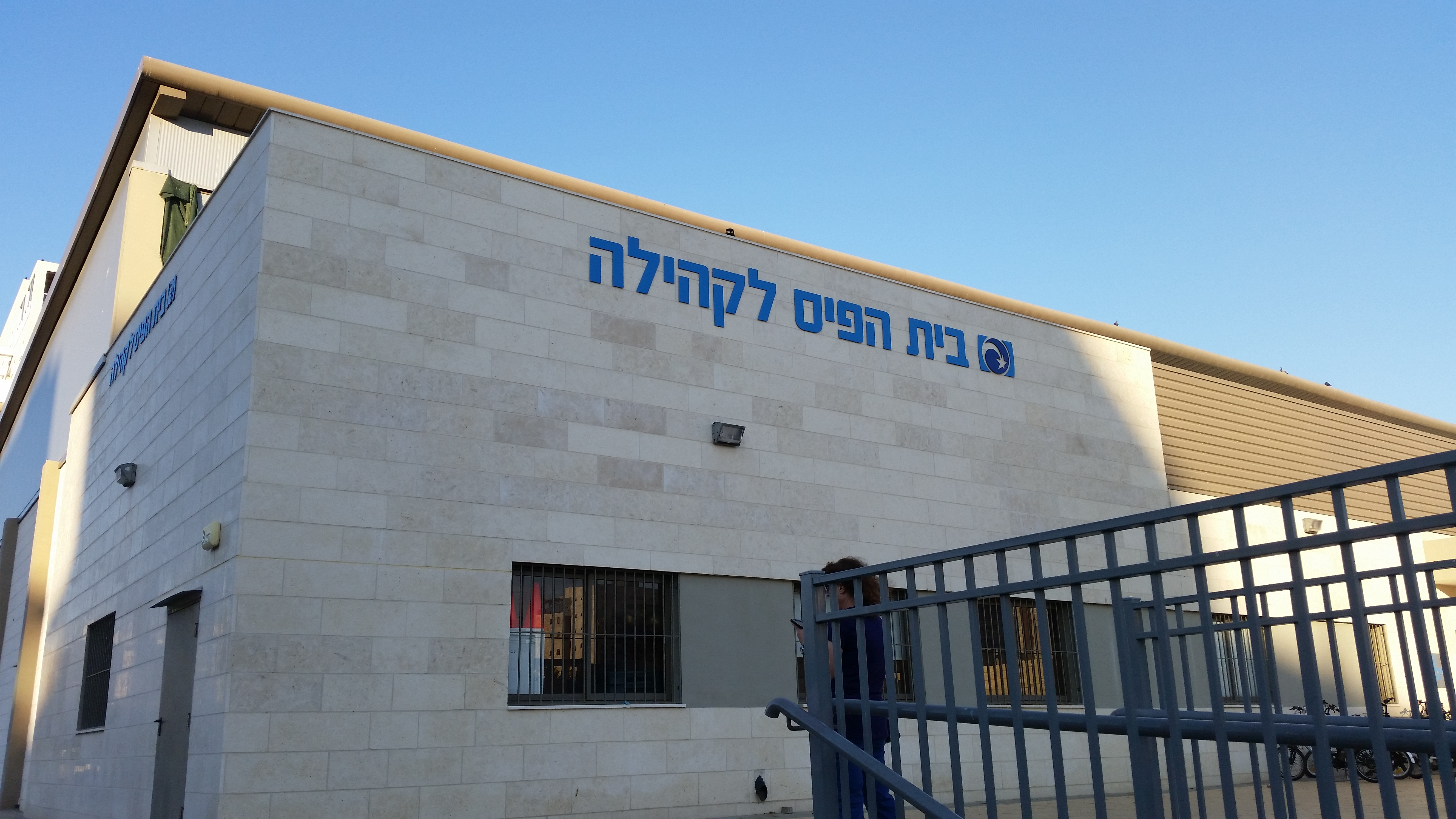 היכל הספורט "בית הפיס" באשדוד